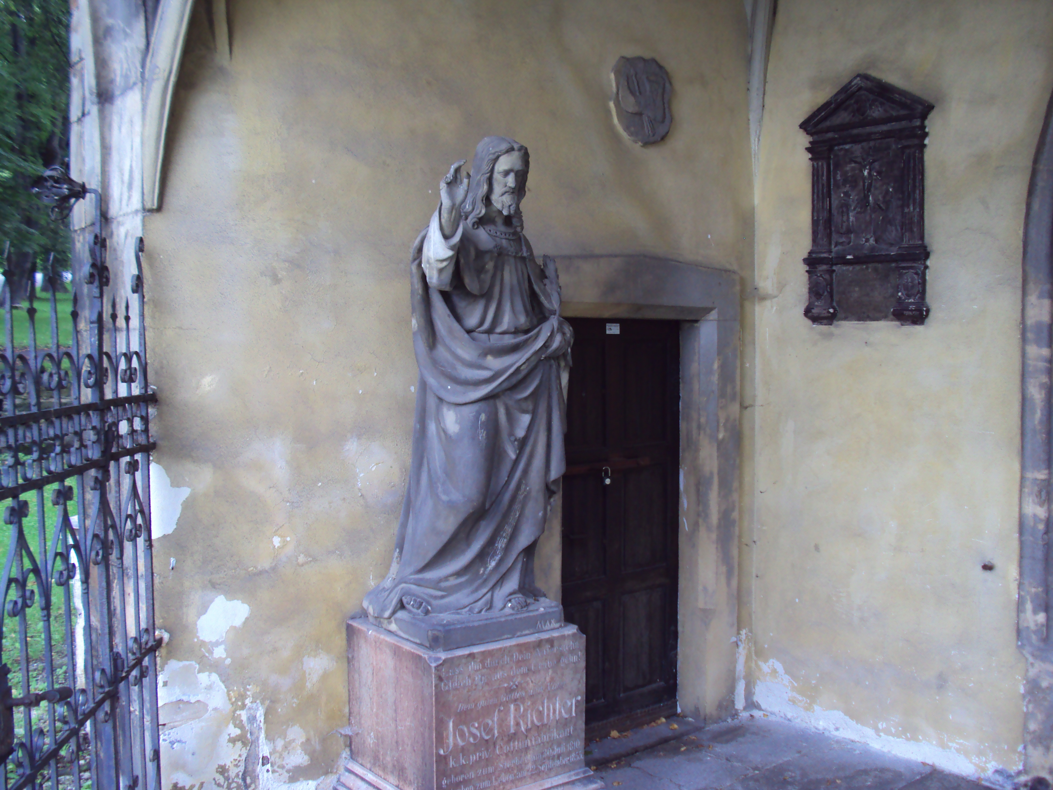 Socha na kryté verandě kostela sv.Kříže v Moskevské ulici